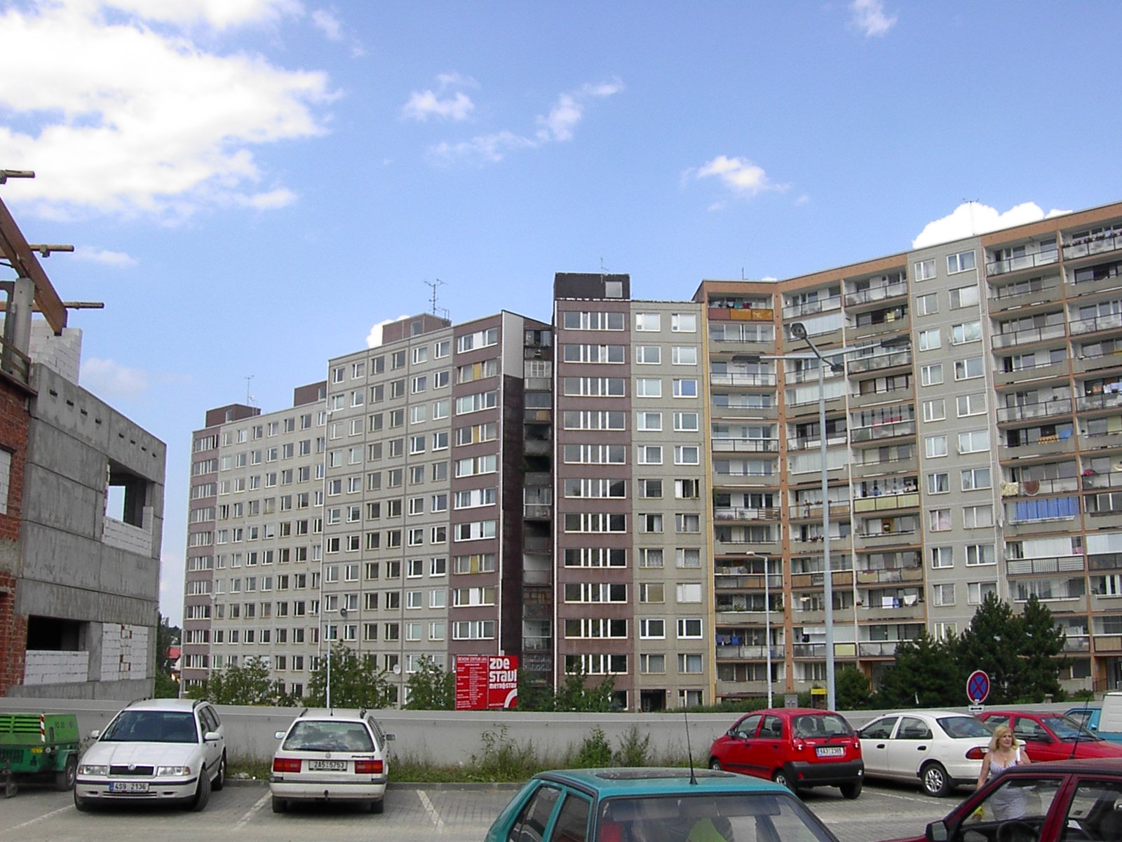 Praha, sídliště Lužiny, ulice U Jezera.